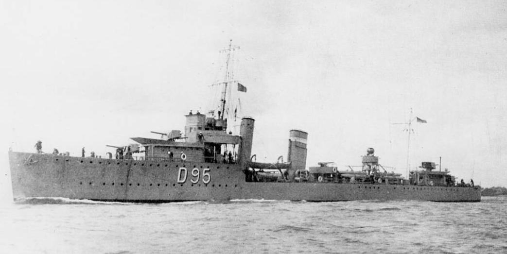 Der Zerstörer HMS WOOLSTON der Thornycroft-mod.W-Klasse